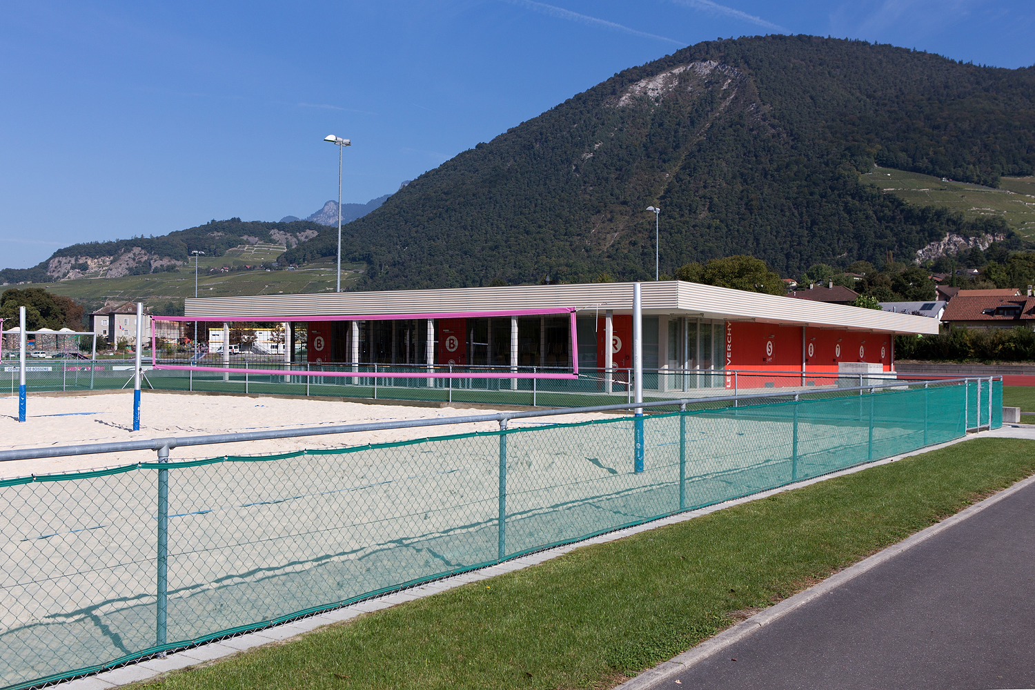 Sportanlage Les Verschy in Ollon